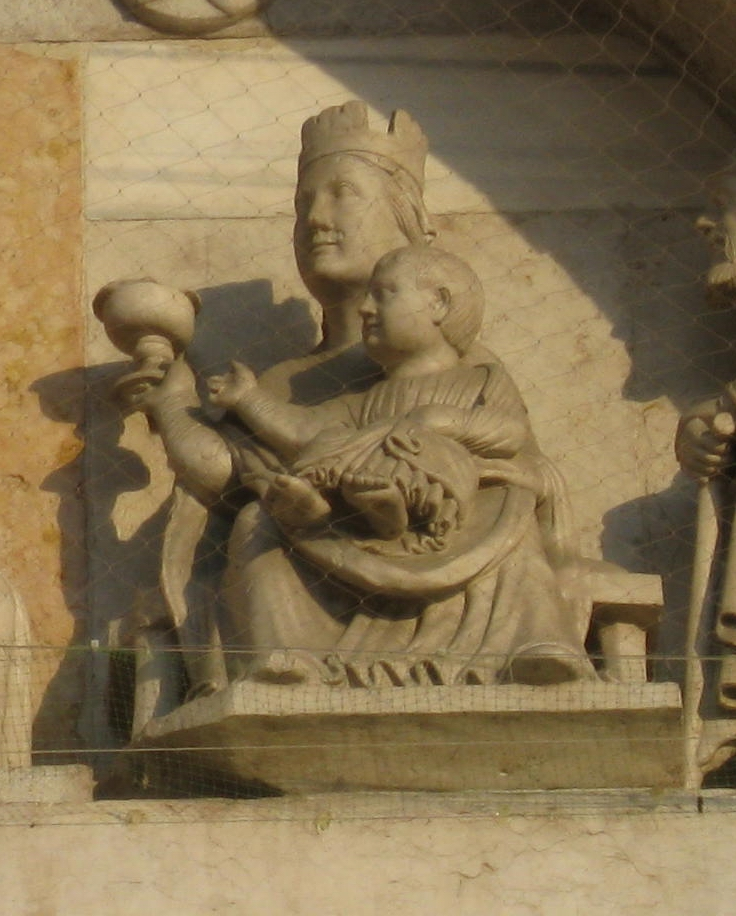 Perkele, Madonna e bambino Gesù, foto propria